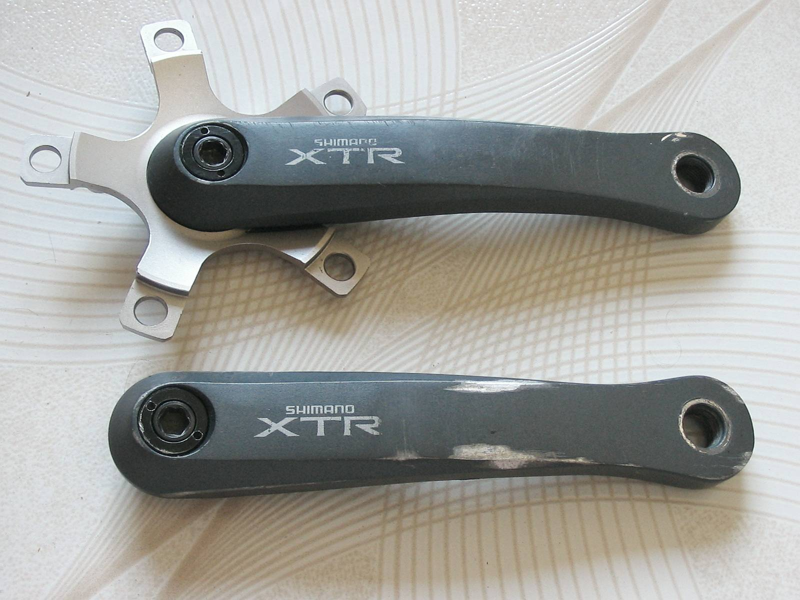 Shimano XTR bicycle cranks